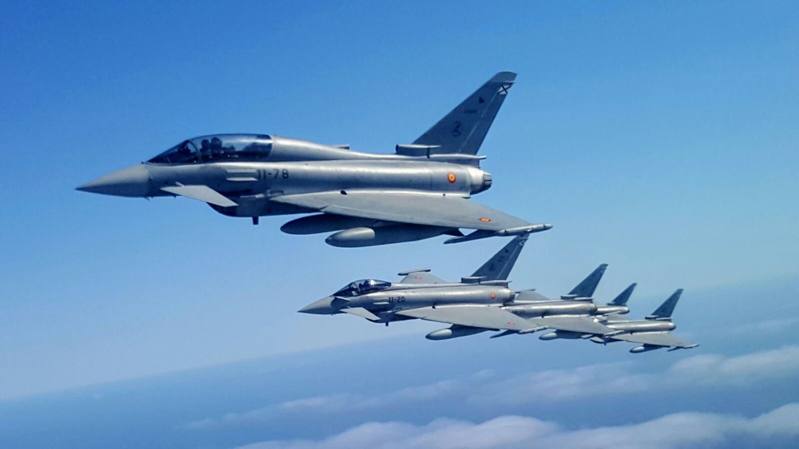 Eurofighter volando en formación